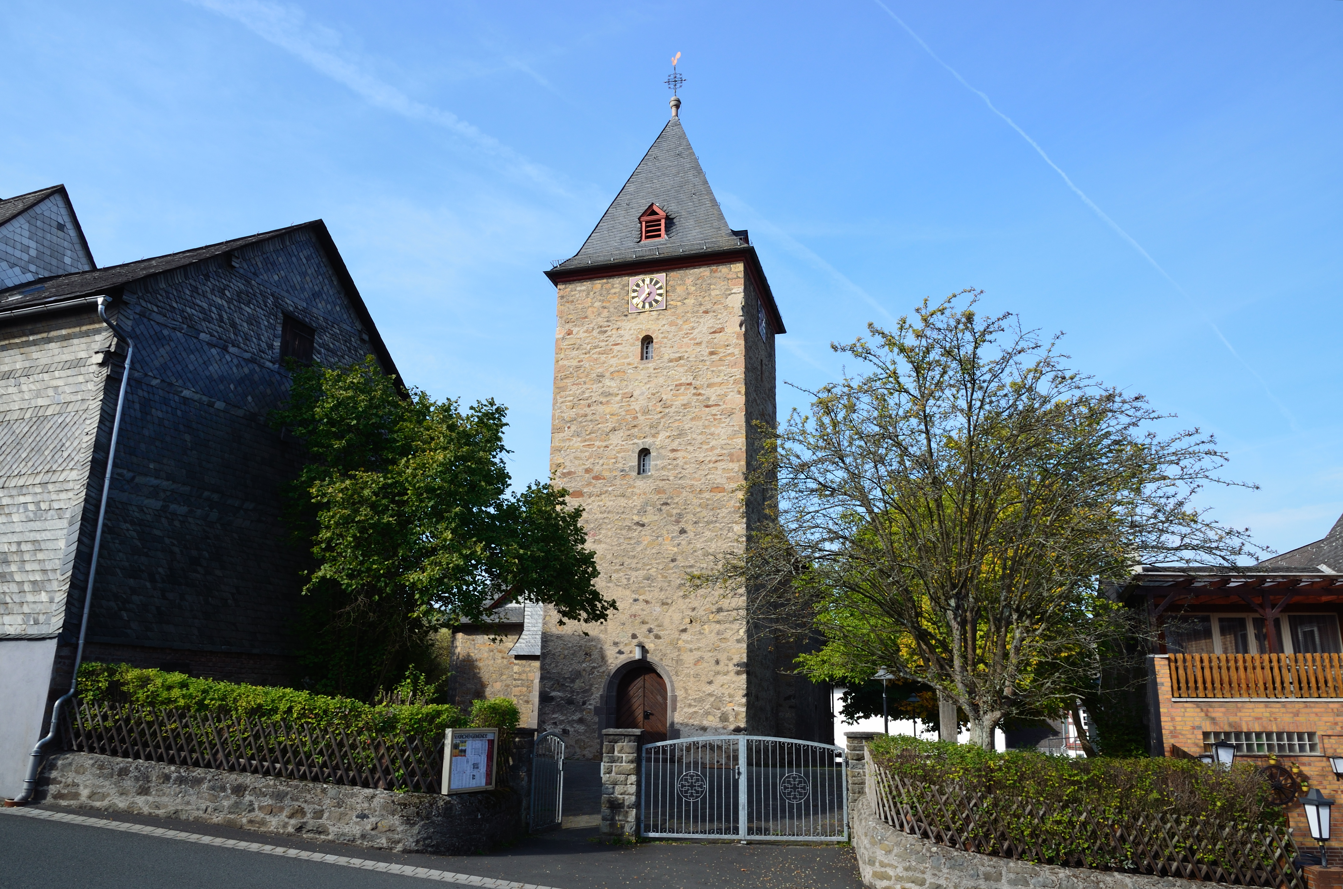 Die ev. Kirche in Ballersbach